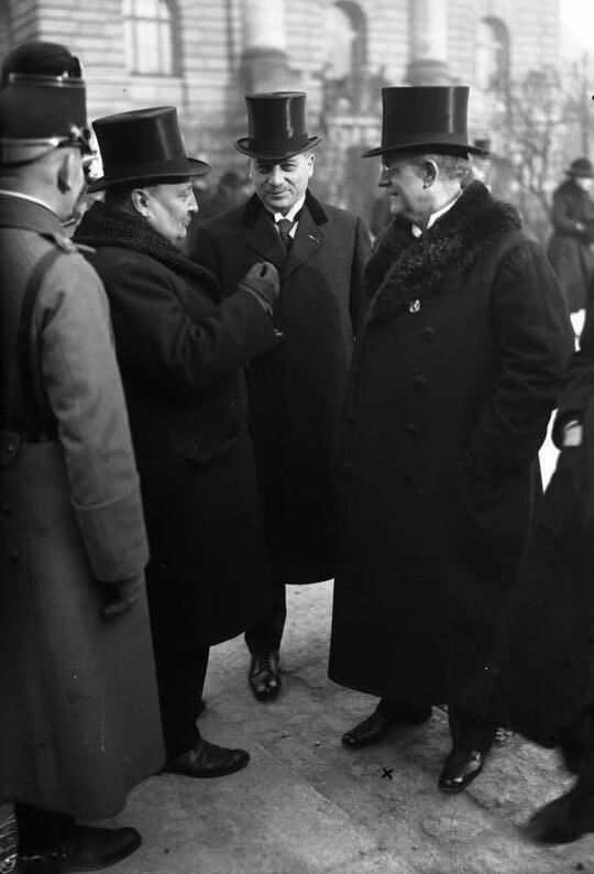 Der bayrische Ministerpräsident Held x wurde von den Bayern für den Reichspräsidentenposten aufgestellt. Letzte Aufnahme desselben.